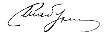 Автограф Станислава Шабуневского.